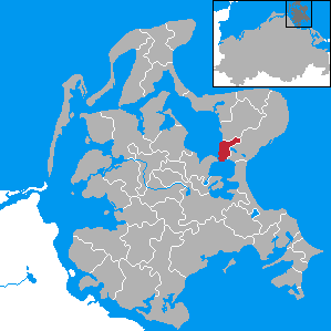 Lietzow, Landkreis Rügen, Mecklenburg-Vorpommern